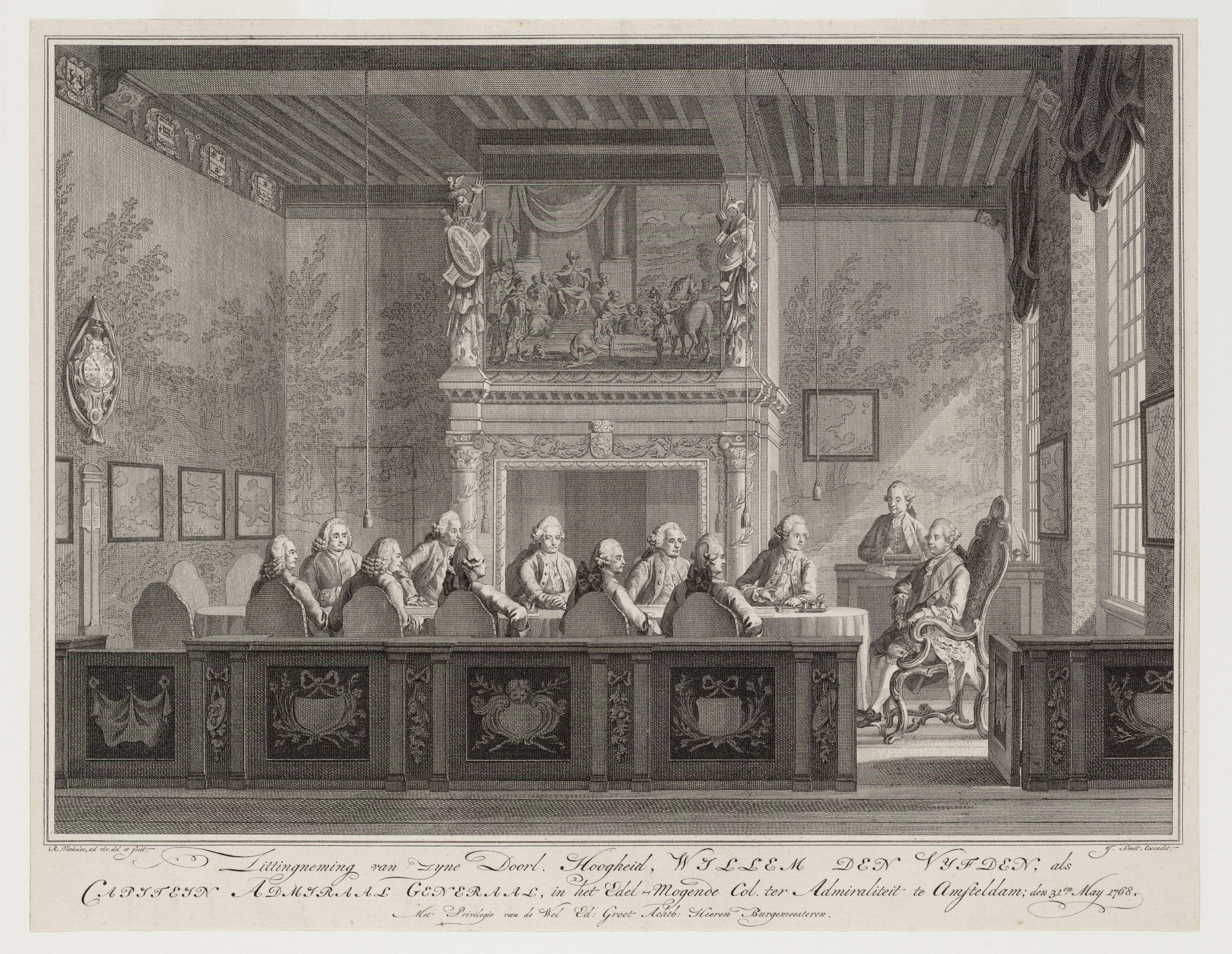 Beschrijving Zittingneming van Zijne Doorl. Hoogheid, Willem den Vijfden ... etc Willem V te Amsterdam. Bezoek aan de vergadering van de Admiraliteit. Techniek: gravure. Documenttype prent Vervaardiger Vinkeles, R. (Reinier ; 1741-1816) Smit, Johannes (uitgever, eind 18e eeuw) Collectie Collectie Stadsarchief Amsterdam: tekeningen en prenten Datering 1768 Inventarissen Afbeeldingsbestand 010097014111